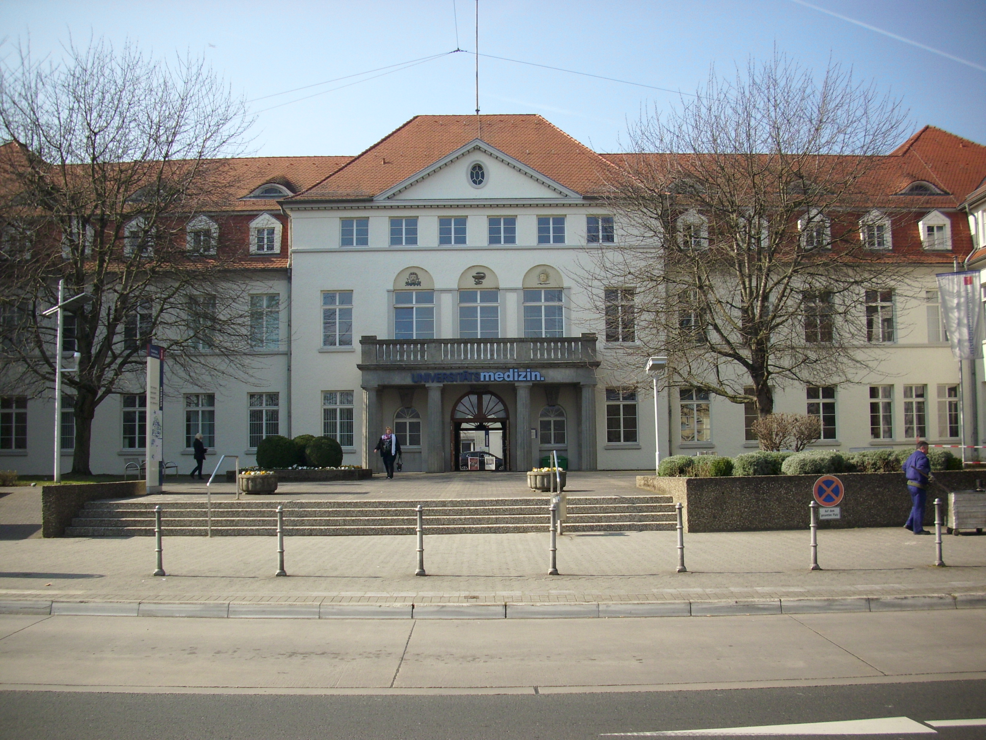 Ehemaliges städtisches Allgemeines Krankenhaus, heute Universitätskliniken; im so genannten Pavillonsystem 1911–14 von Adolf Gelius erbaute achsensymmetrisch ausgerichtete Anlage aus drei, durch Korridore verbundene Gebäudereihen; Patientenhäuser, zweigeschossige Putzbauten; langgestreckte Krankenbauten mit zweieinhalbgeschossigen Mittelpavillons und Seitenrisaliten; zentrale Gartenanlage mit Brunnenschale